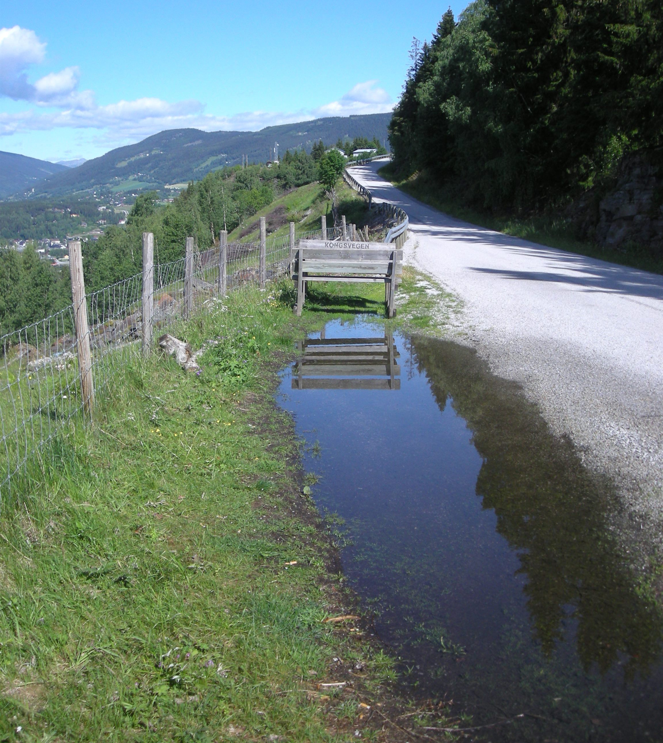 Fylkesvei 379 i åsen over Vålebru (Ringebu sentrum)